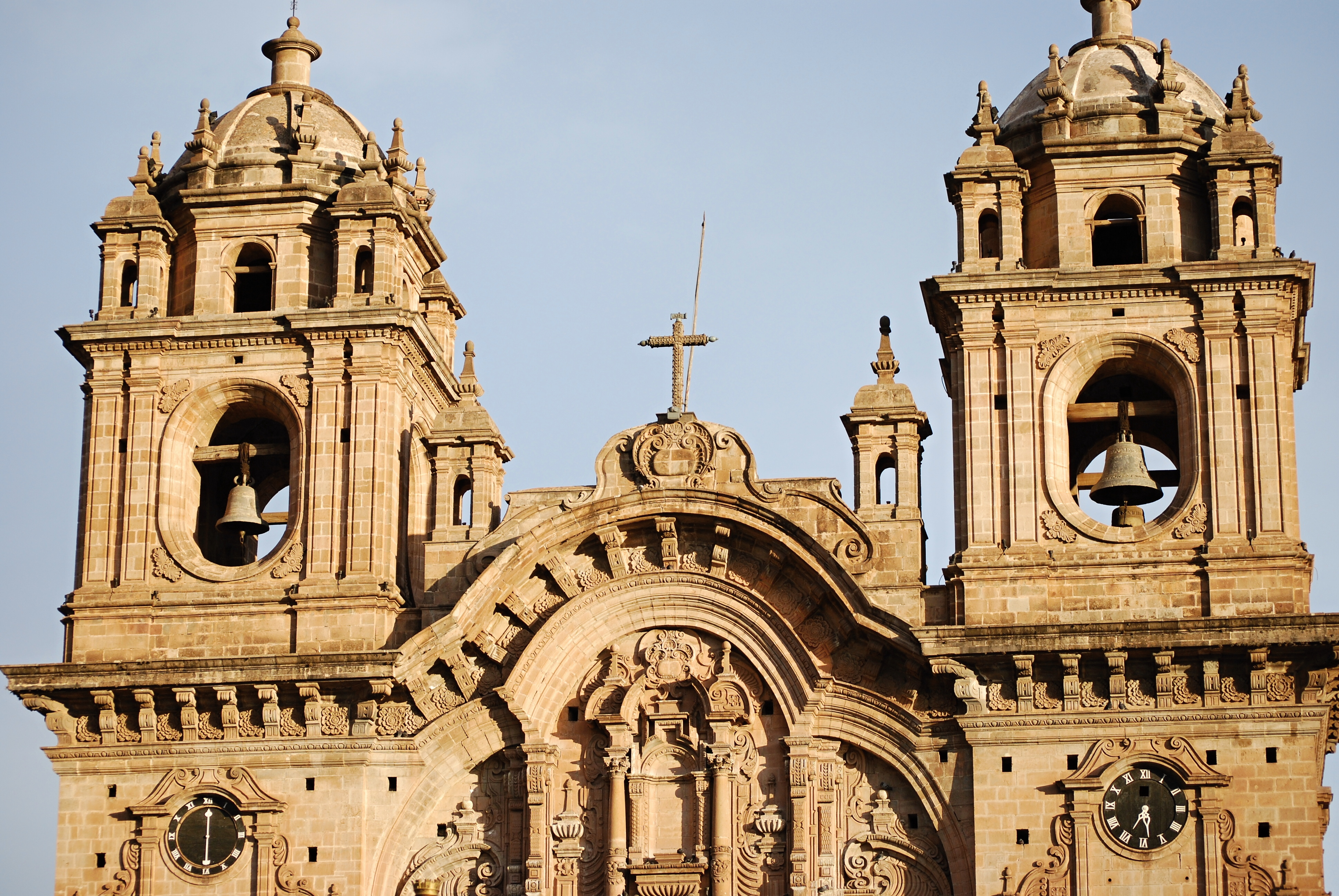 Cusco - La Compaňia